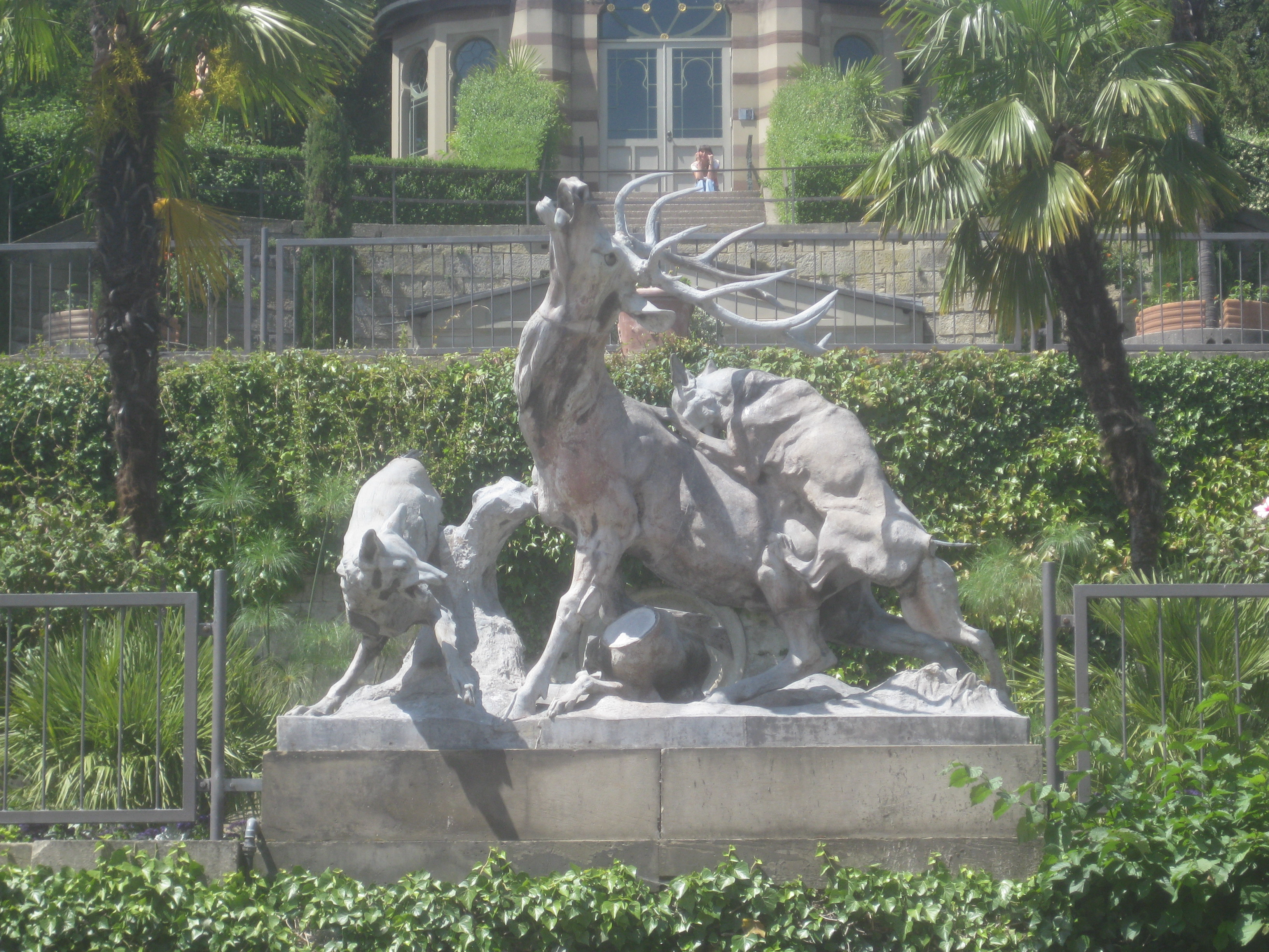 Albert Güldenstein / Guss: Wilhelm Pelargus: Hirsch von Wölfen angefallen ((Vorderansicht), Zinkguss, beschädigt, Entstehungsjahr 1852, Stuttgart, Wilhelma, mitten auf der ersten Stützmauer der Terrassenanlage hinter dem Maurischen Landhaus.